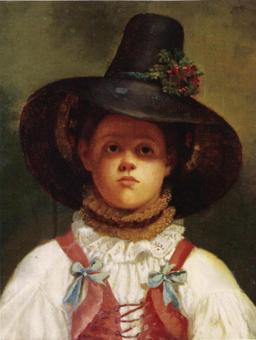 Zélé Agricolan maalaus.